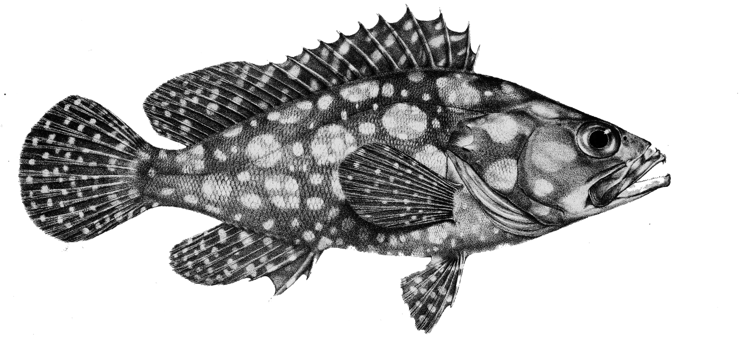 Epinephelus ongus